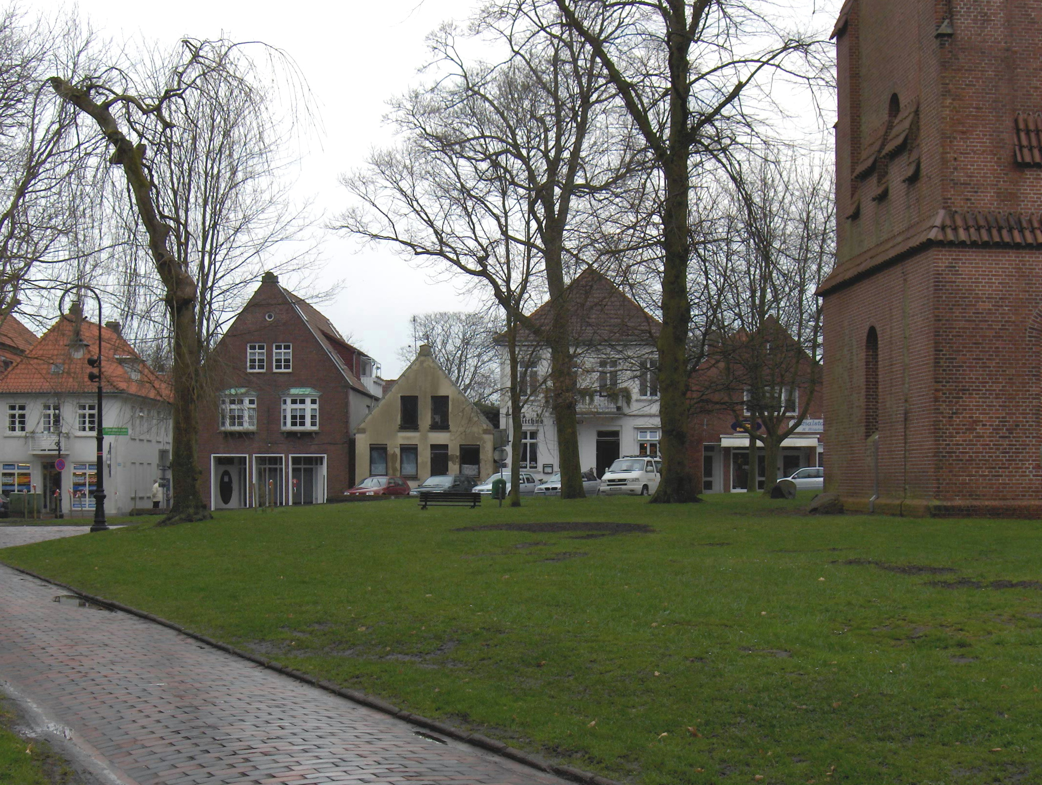 Jever, Kirchplatz mit Glockenturm (zelf gemaakte foto)